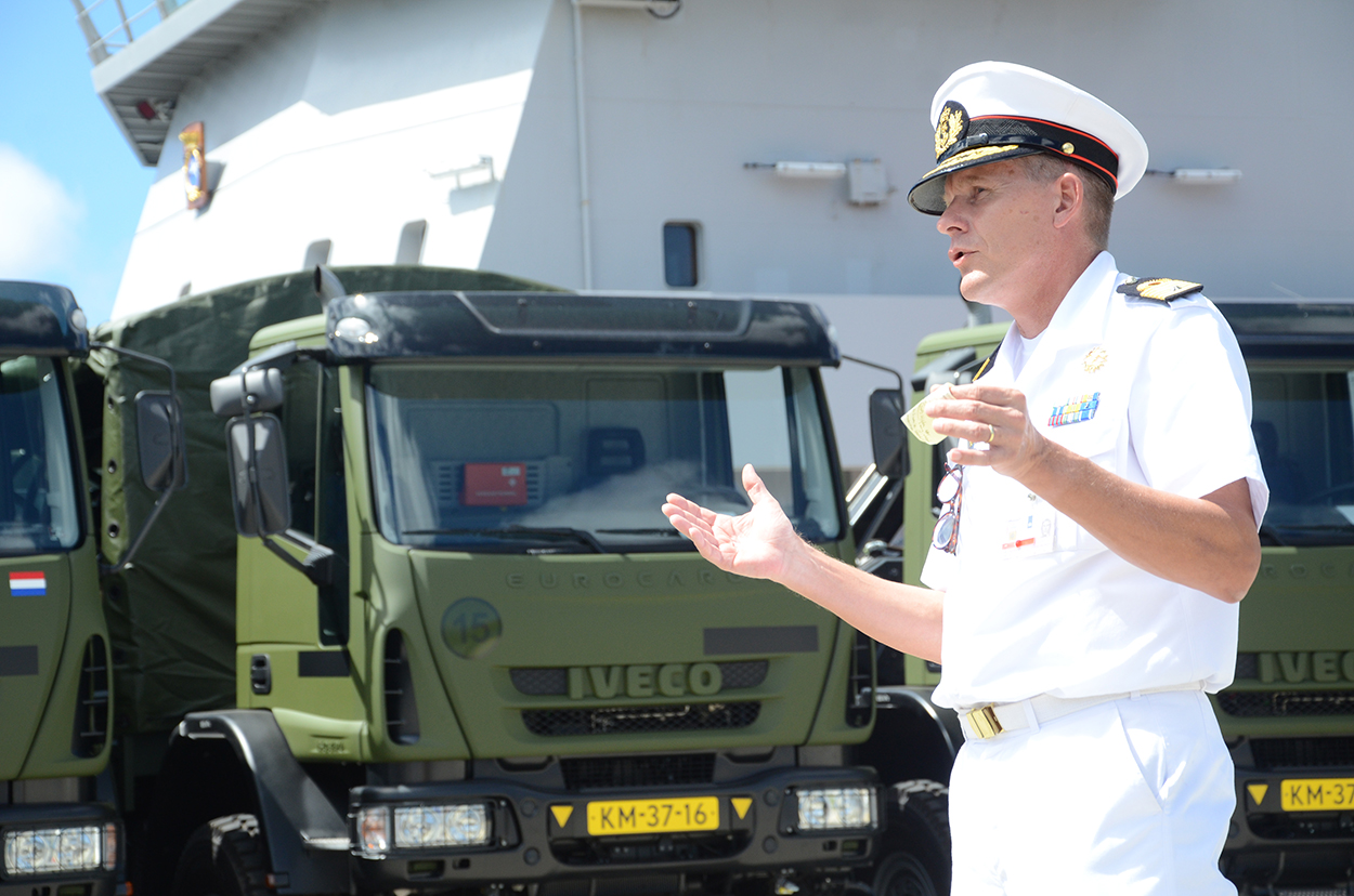 Commandant CZMCARIB brigadegeneraal der mariniers Peter Jan de Vin neemt nieuwe 4-tonner en 10-tonner voertuigen in ontvangst voor Defensie in het Caribisch gebied. De voertuigen zijn zo ontworpen dat ze mee kunnen worden genomen door ondersteuningsschip 'Pelikaan'.